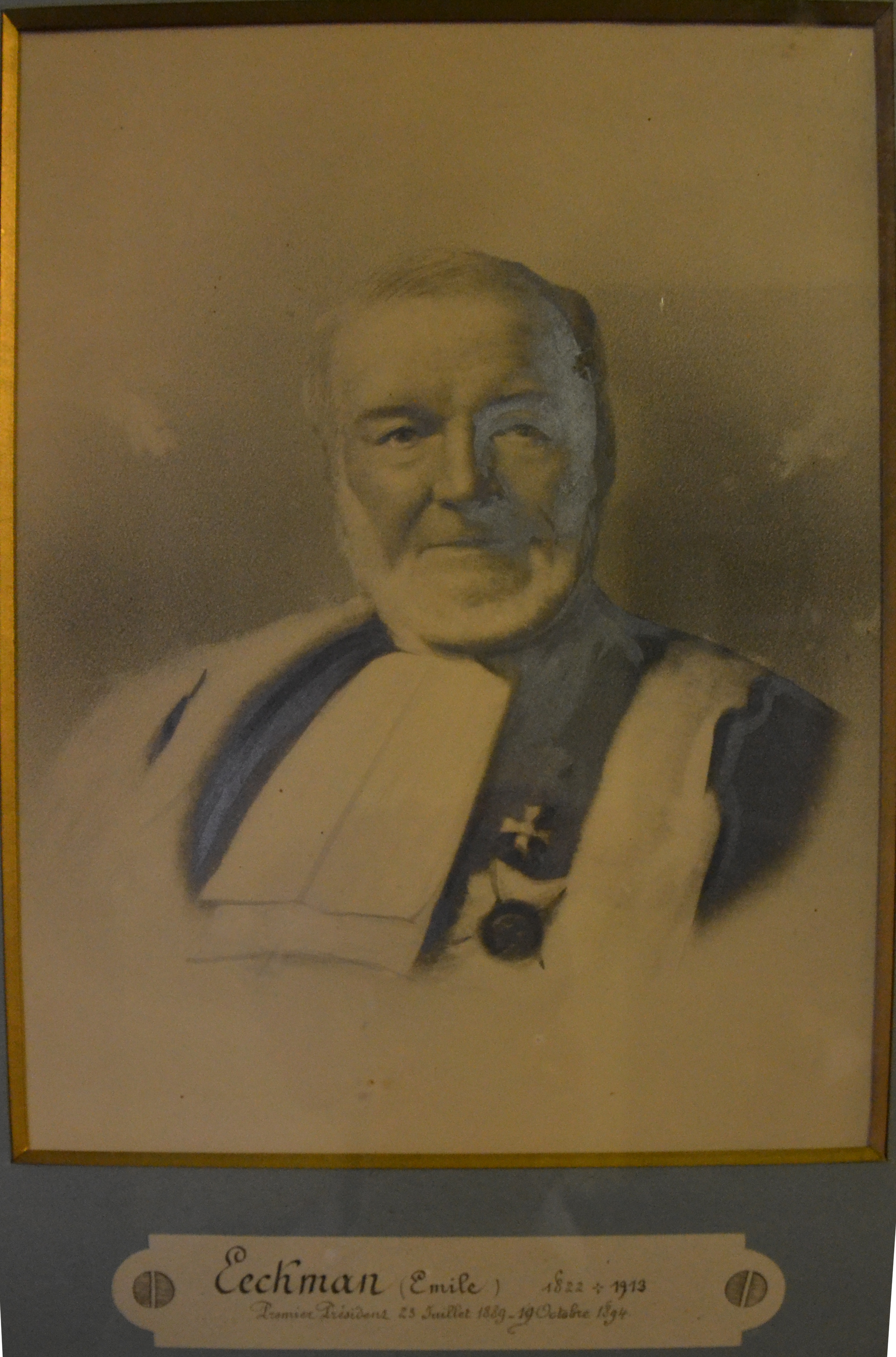 Premier président honoraire de la cour d'appel de Bruxelles (23 juillet 1889 - 19 octobre 1894). Ce portait pend dans la galerie des portraits des premiers présidents de la cour d'appel de Bruxelles du Palais de Justice de Bruxelles, Place Poelaert.